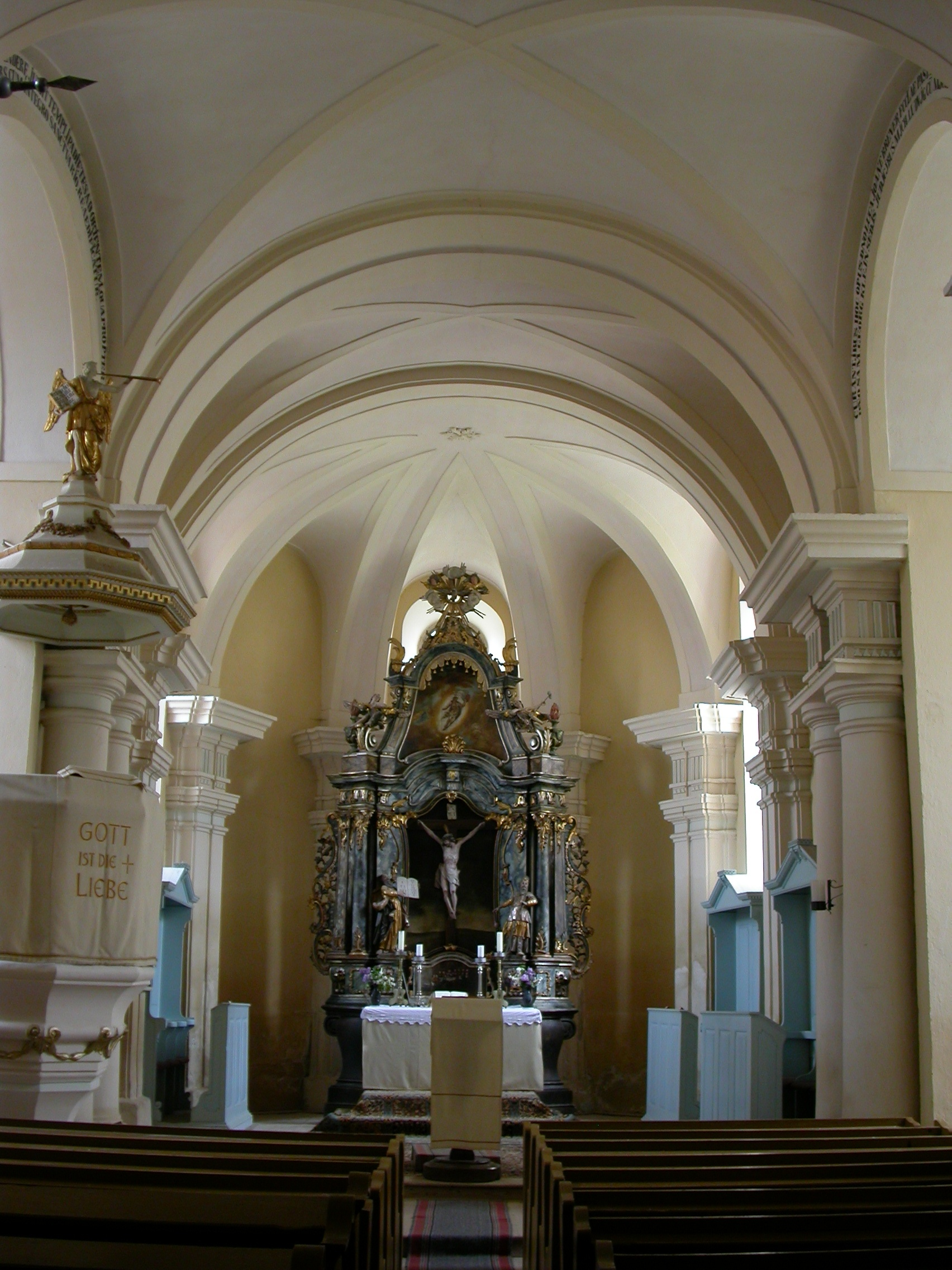 Ansamblul bisericii evanghelice fortificate, sec. XIII-XIX